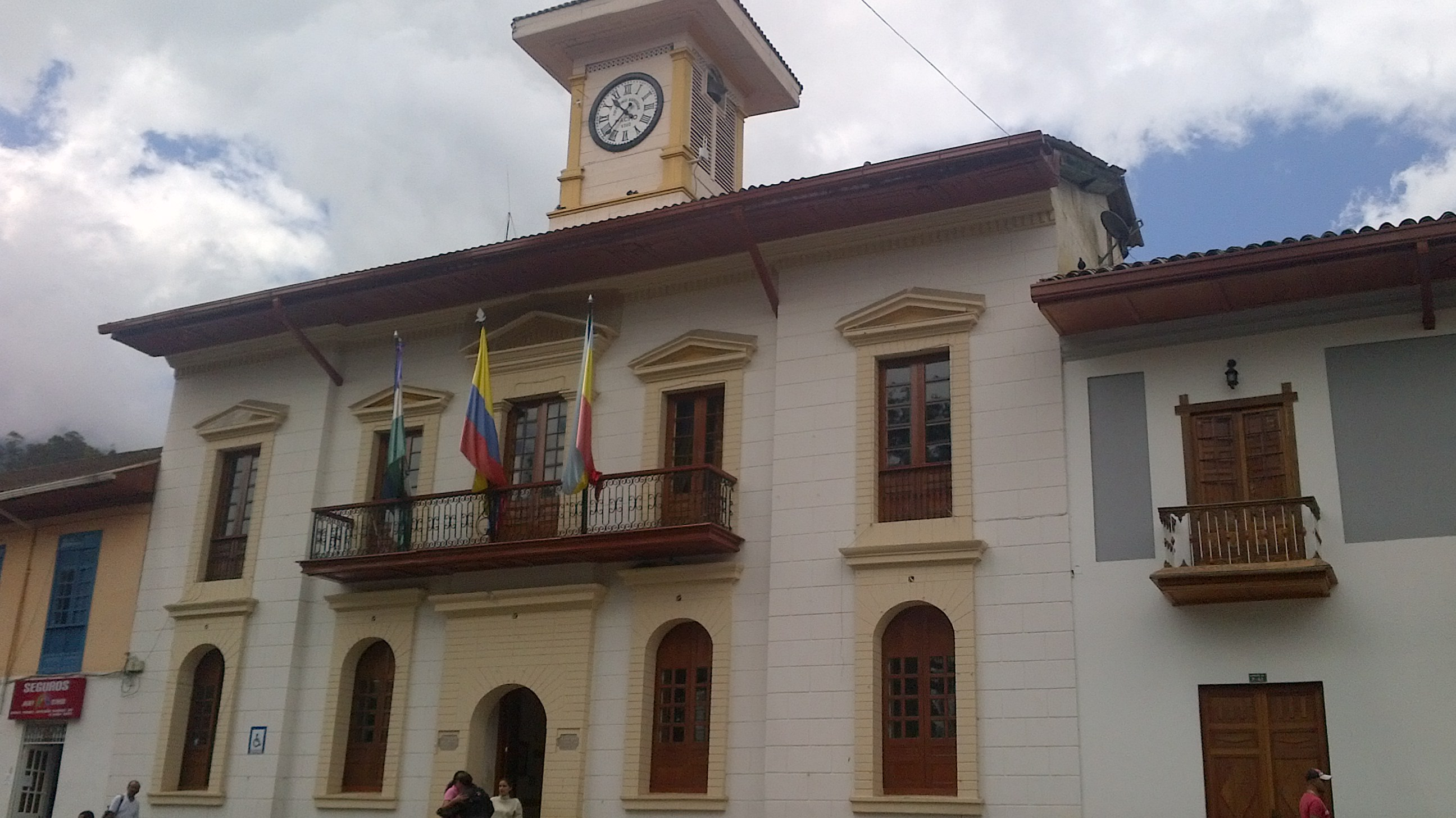 Alcaldia Municipal de Pacho